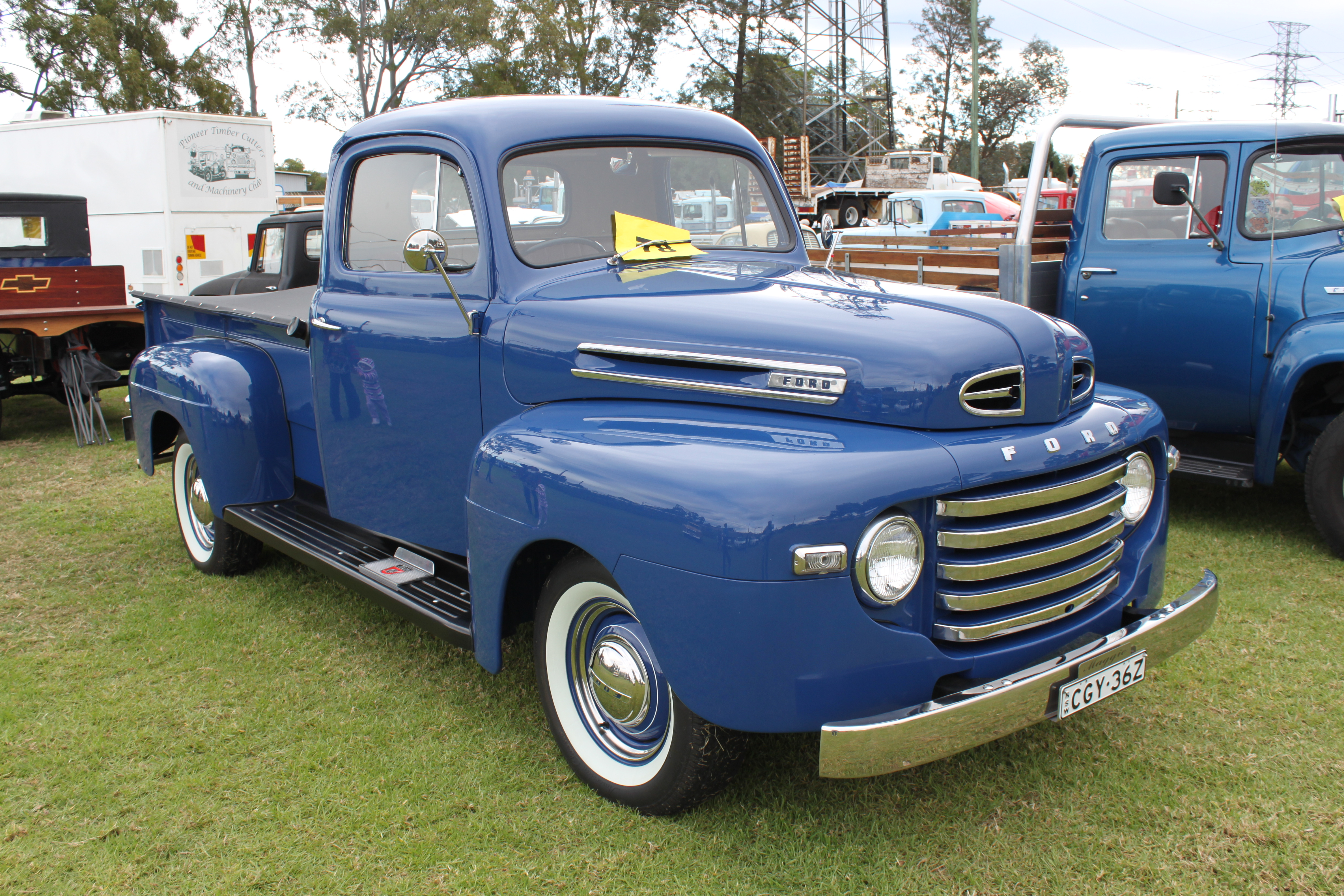 1948 Ford Freighter Ute